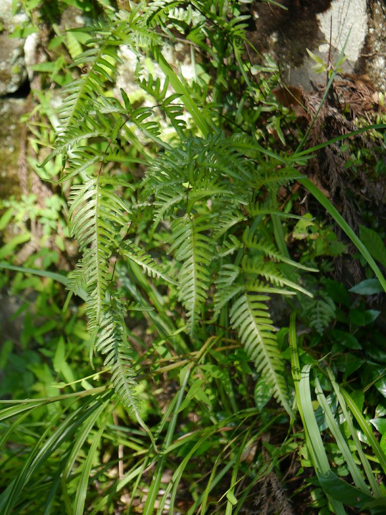 Pteris dispar：アマクサシダ 2014/09/28 和歌山県田辺市：Tanabe City. Wakayama Pref. Japan